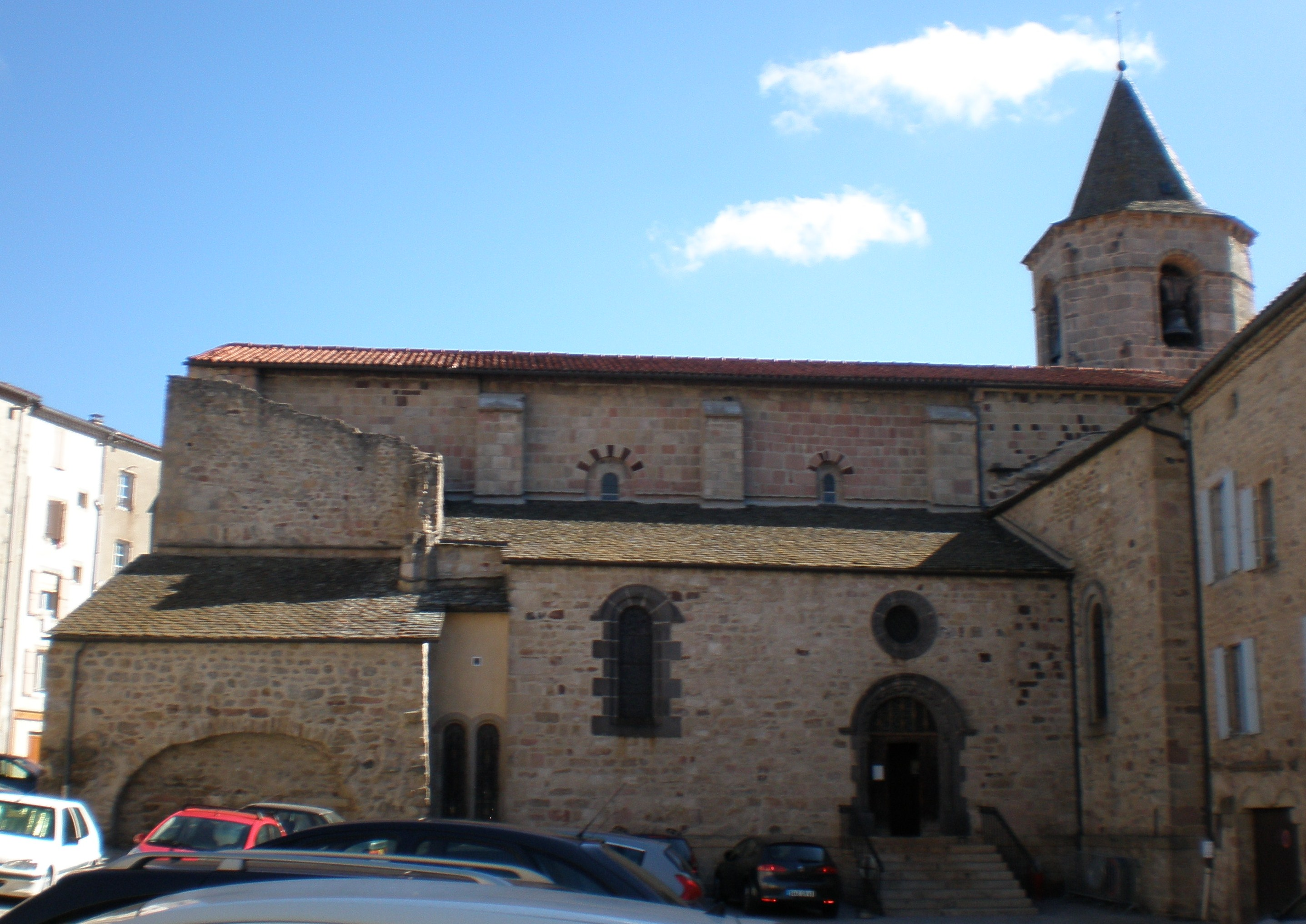 L'église romane Saint-Gervais et Saint-Protais de Langogne (Lozère)